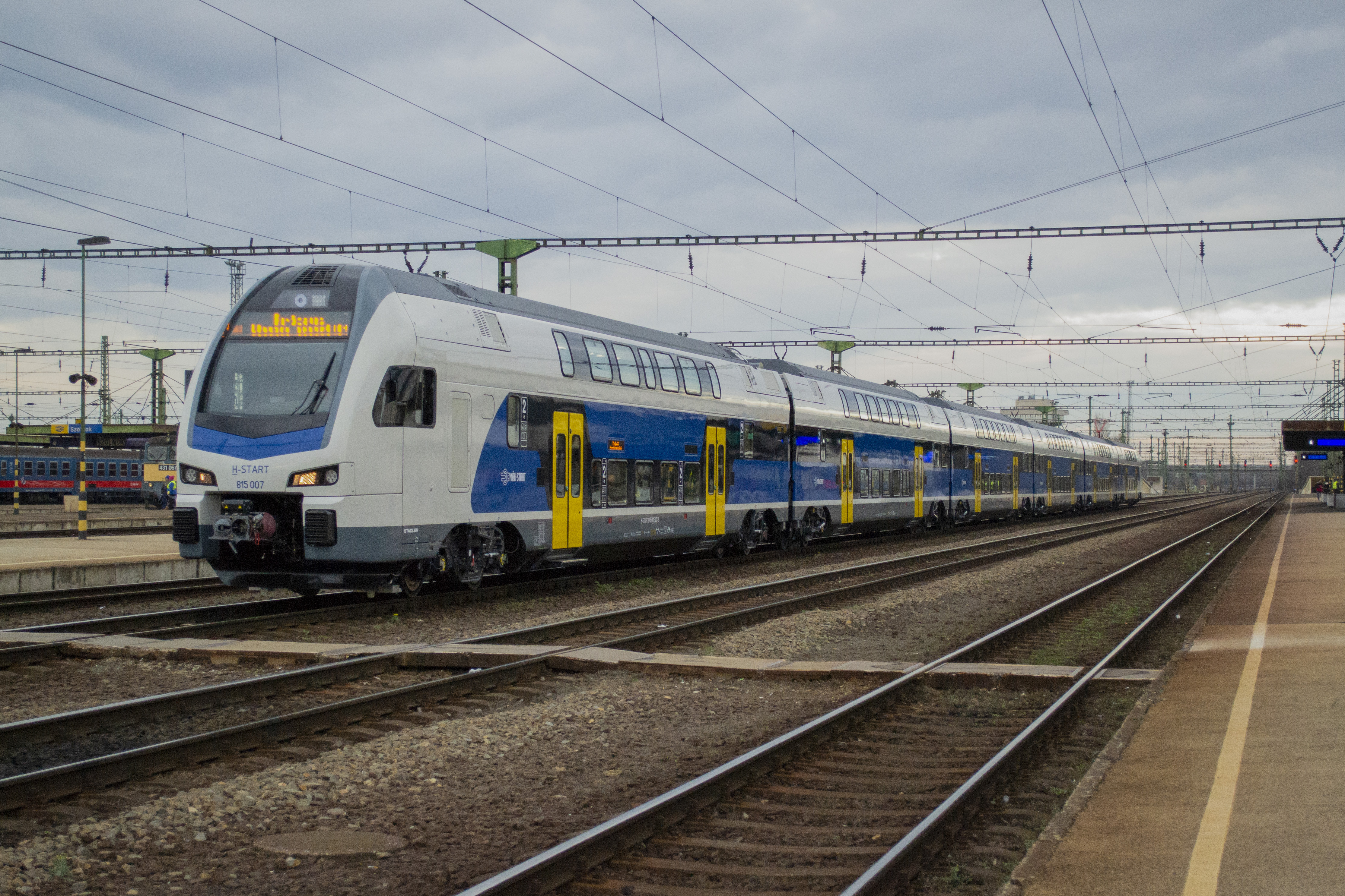 Stadler KISS indul Dunakeszire a 6. vágányról